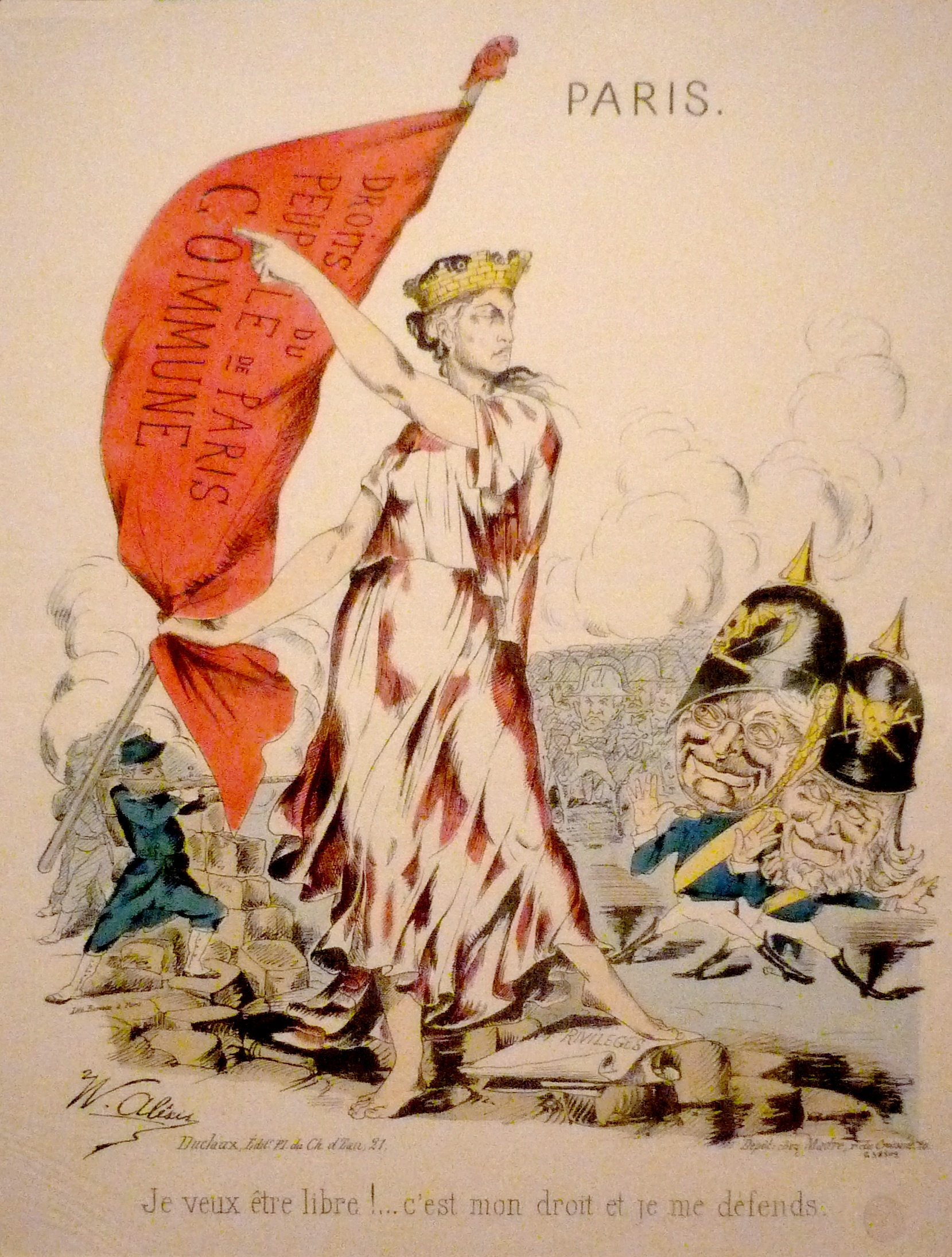 Exposition La Commune de Paris à l'Hôtel de Ville de Paris (18 mars- 28 mai 2011) - Lithographie de W.Alexis "Je veux être libre !" - Fonds du Musée Carnavalet, Paris